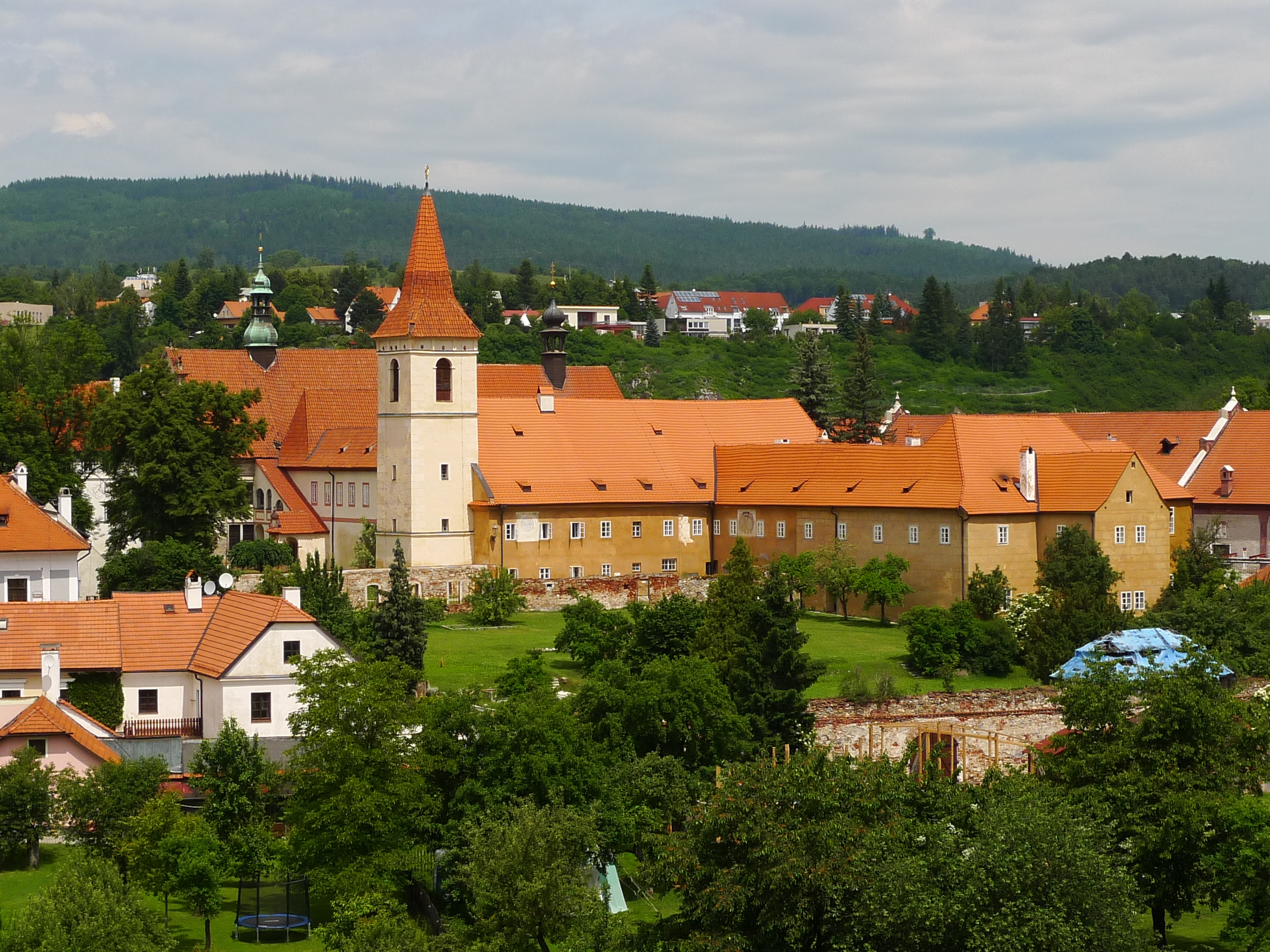 Klášter minoritský (Český Krumlov), Klášterní 50, Český Krumlov